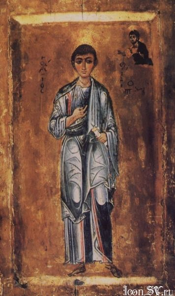 Апостол Филипп Византия. X век. Египет, монастырь св. Екатерины на Синае ,32,8 х 20,2 см